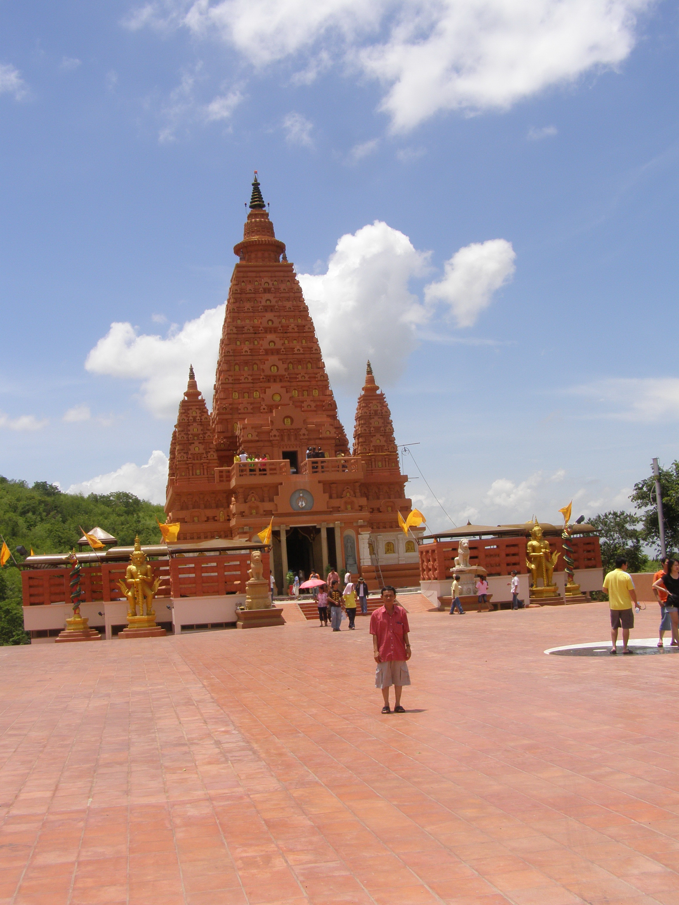 Wat Khao Khok Phen จังหวัดนครสวรรค์